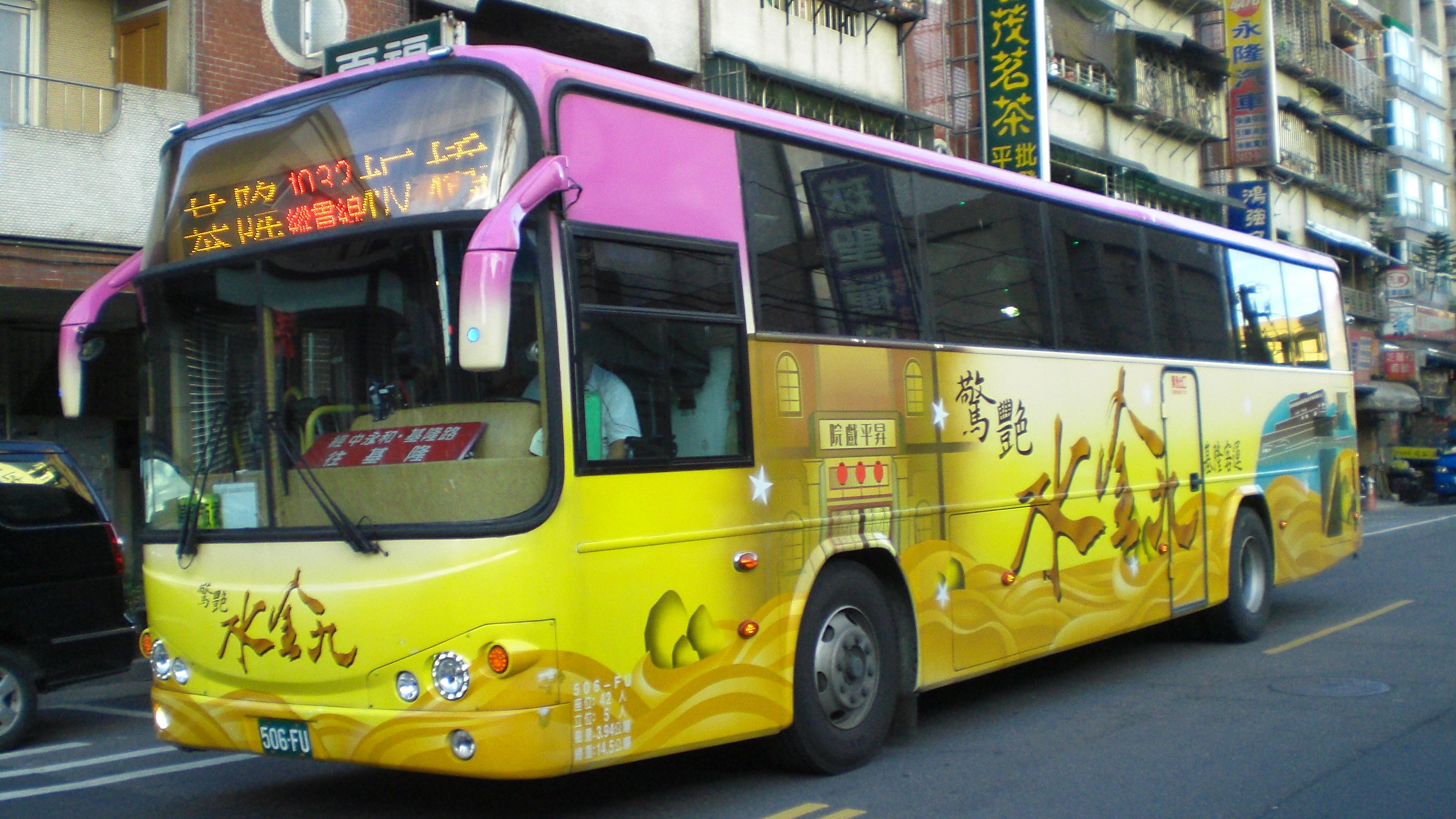 基隆客運日野RK8JRSA大客車506-FU行駛1032線。